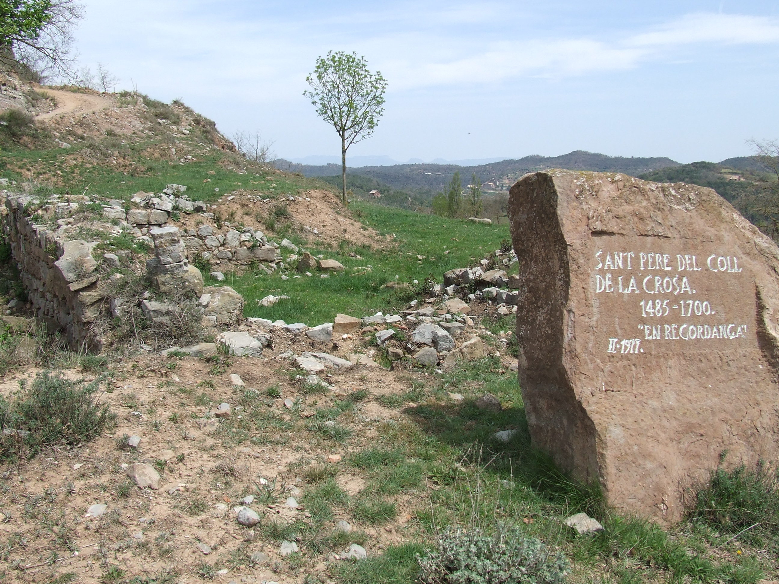 Sant Pere del Coll de la Crossa (l'Estany, Moianès)